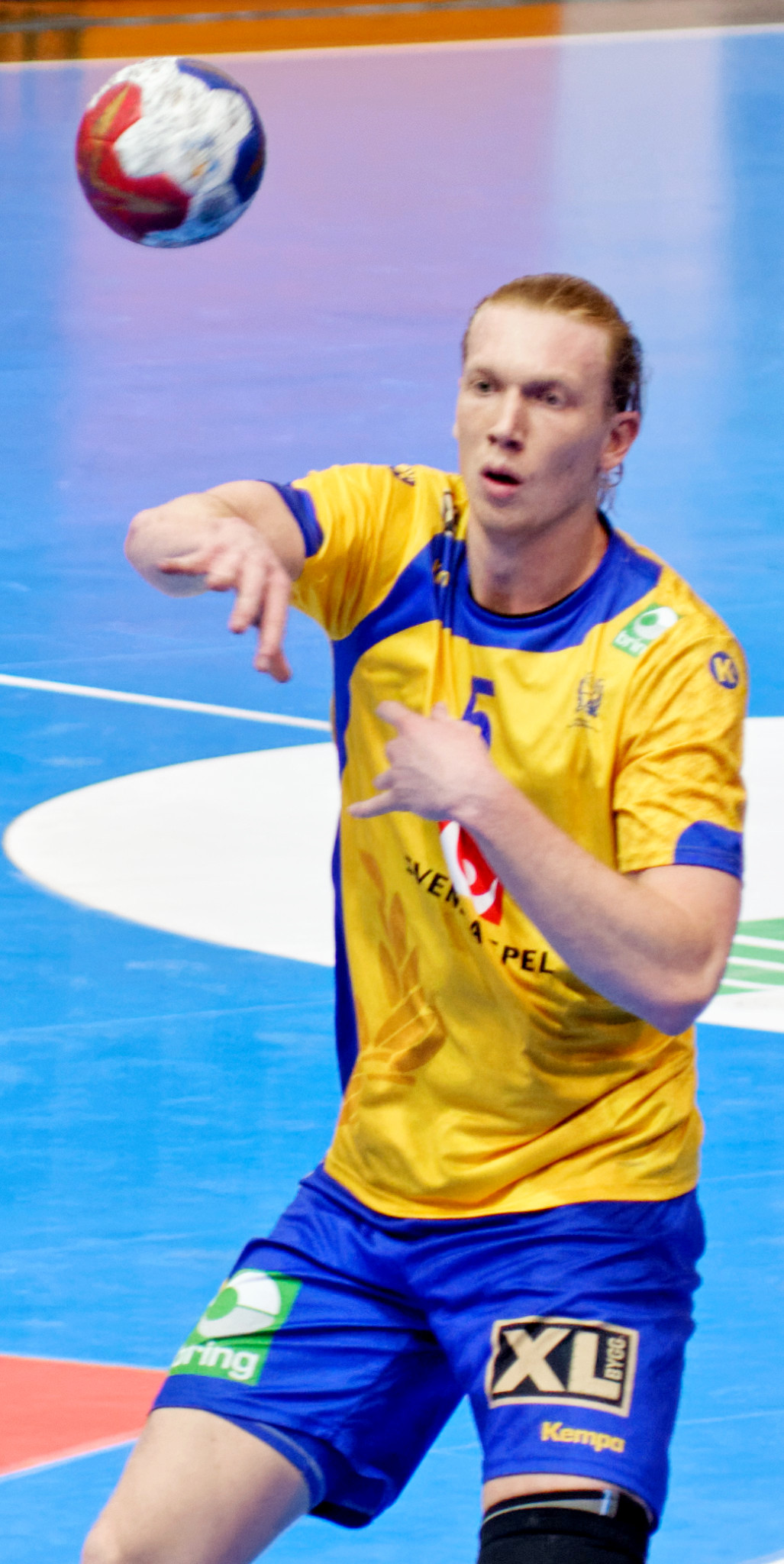 Match de la phase préliminaire du championnat du monde masculin de handball 2017 entre la Suède et le Qatar (Groupe D). A Bercy, le 18 janvier 2017.